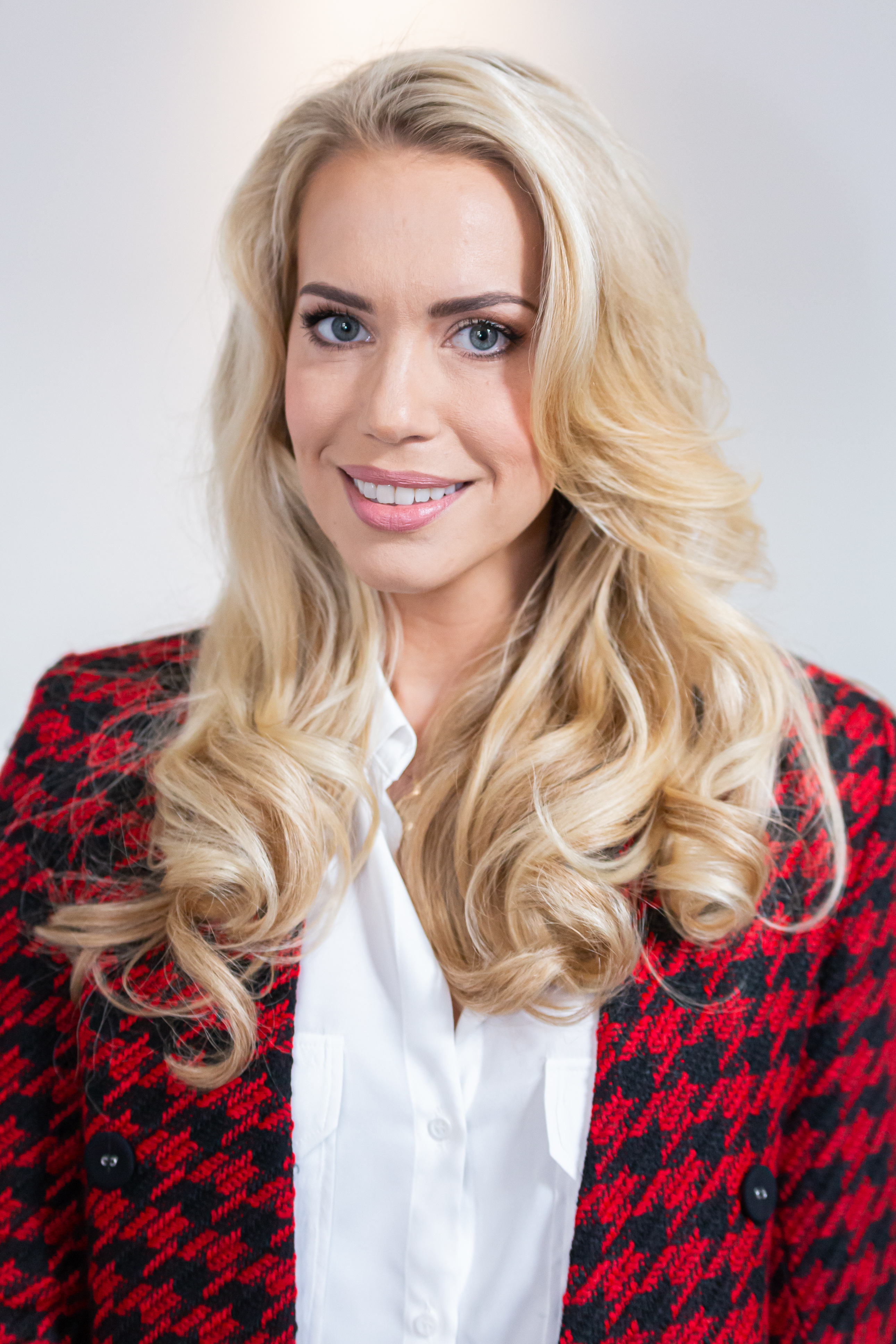 TV, ARD, Cast "Rote Rosen" Staffel 16; Lara-Isabelle Rentinck